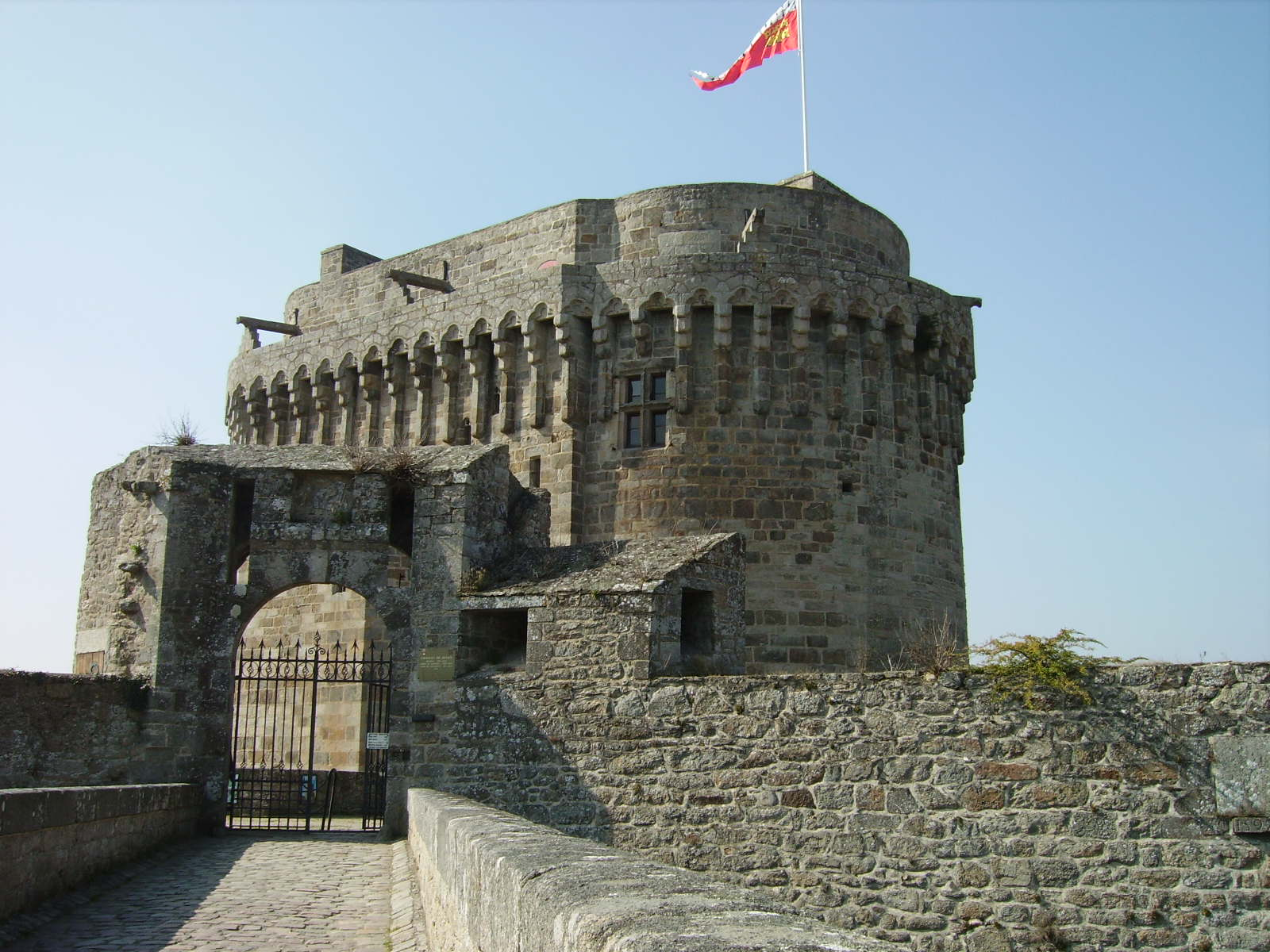 Ĉefturo de la kastelo de Dinan